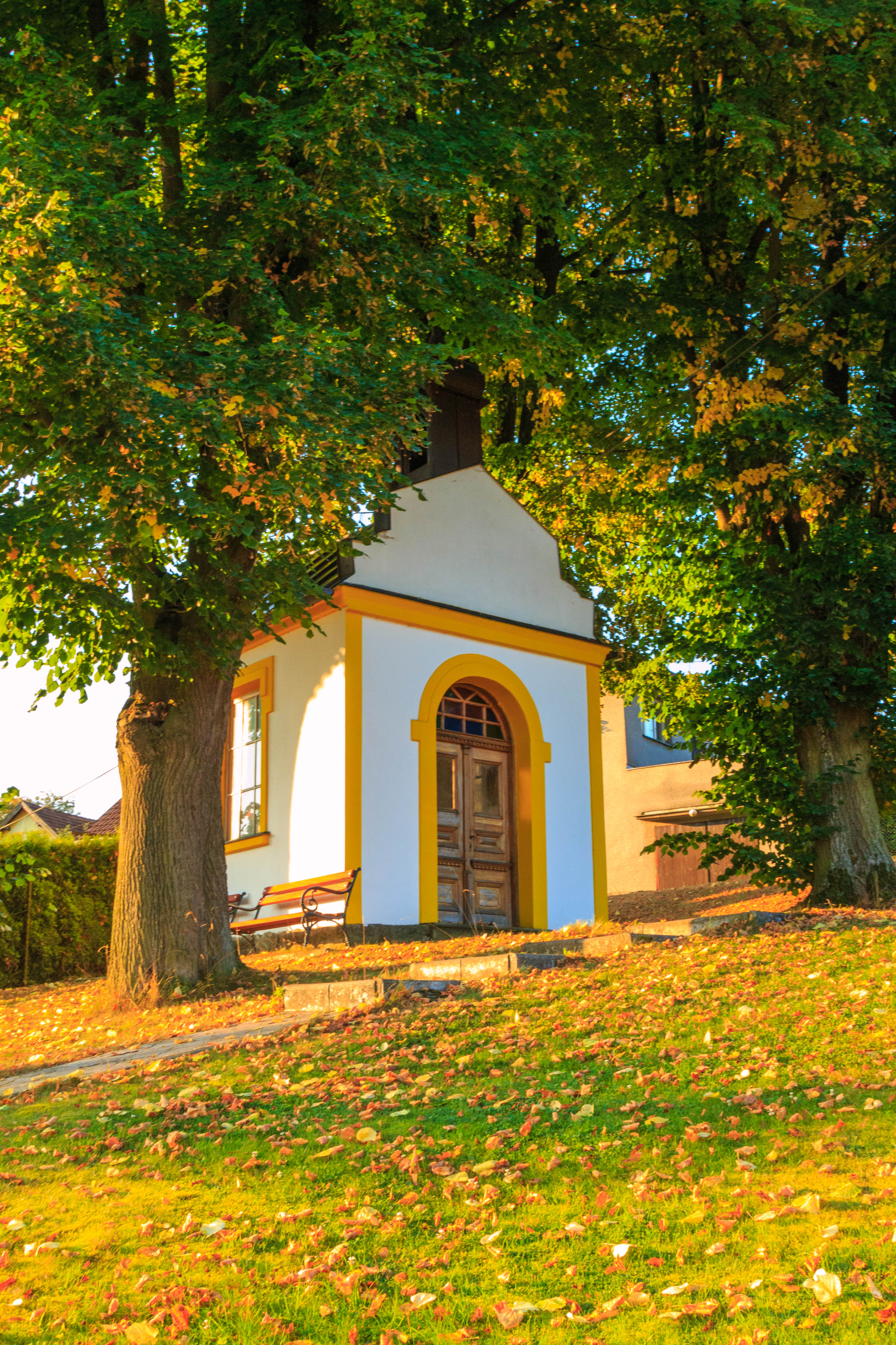 Služátky u Světlé nad Sázavou - kaple Panny Marie